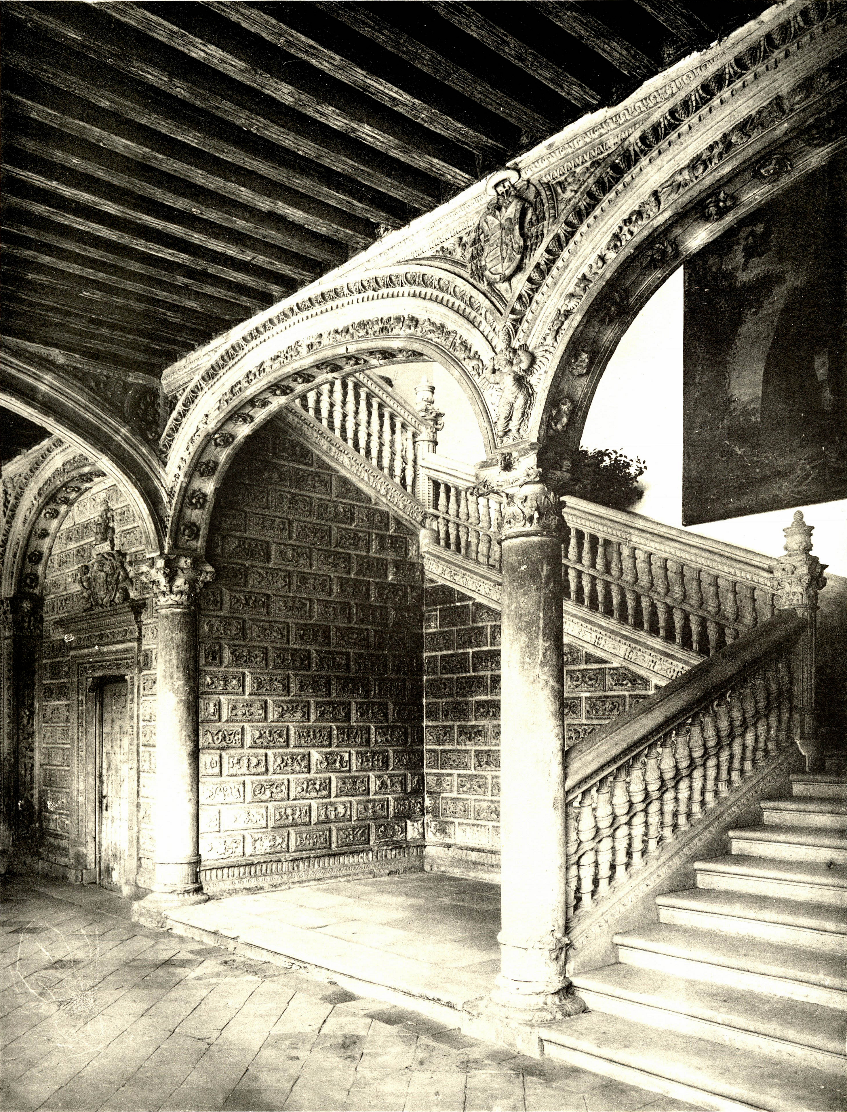 Fotografía de Constantin Uhde realizada en 1888, en la que aparece la "Escalera de Covarrubias" del Palacio Arzobispal de Alcalá de Henares (Comunidad de Madrid - España). Publicada en 1892 en el libro Baudenkmäler in Spanien und Portugal.